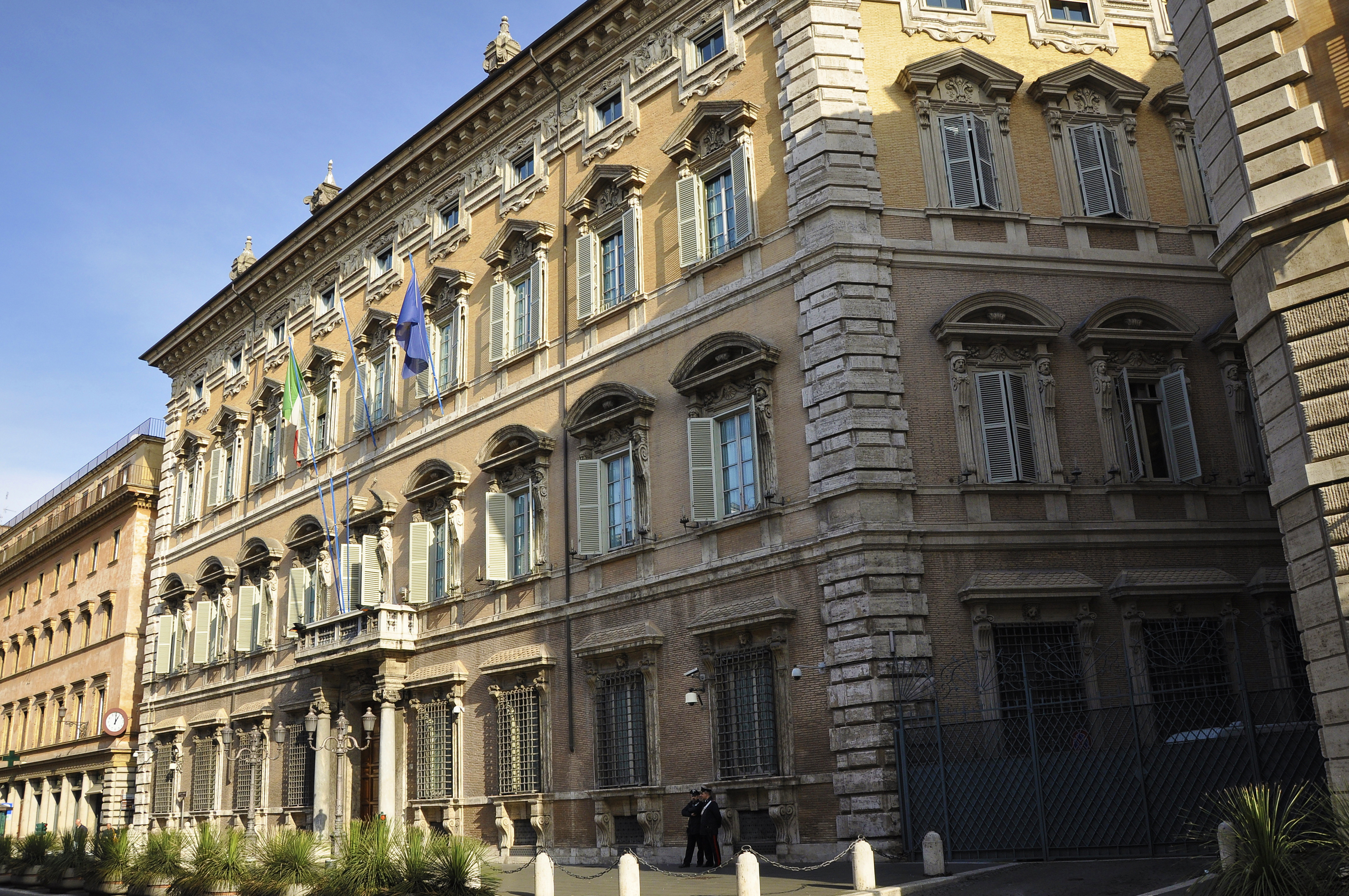 Palazzo Madama in Rome